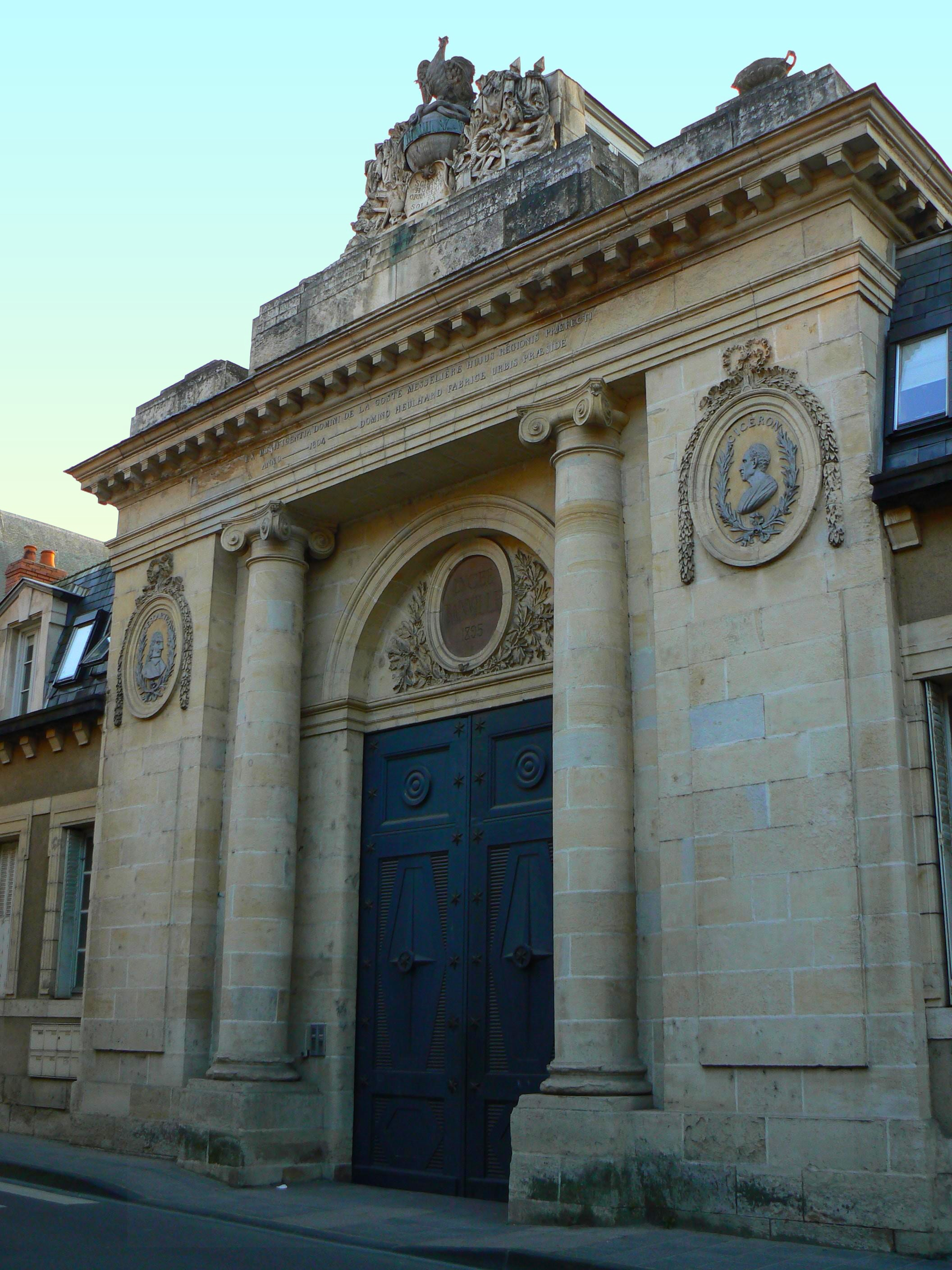 Portail d'honneur du lycée Théodore de Banville, à Moulins (Allier)